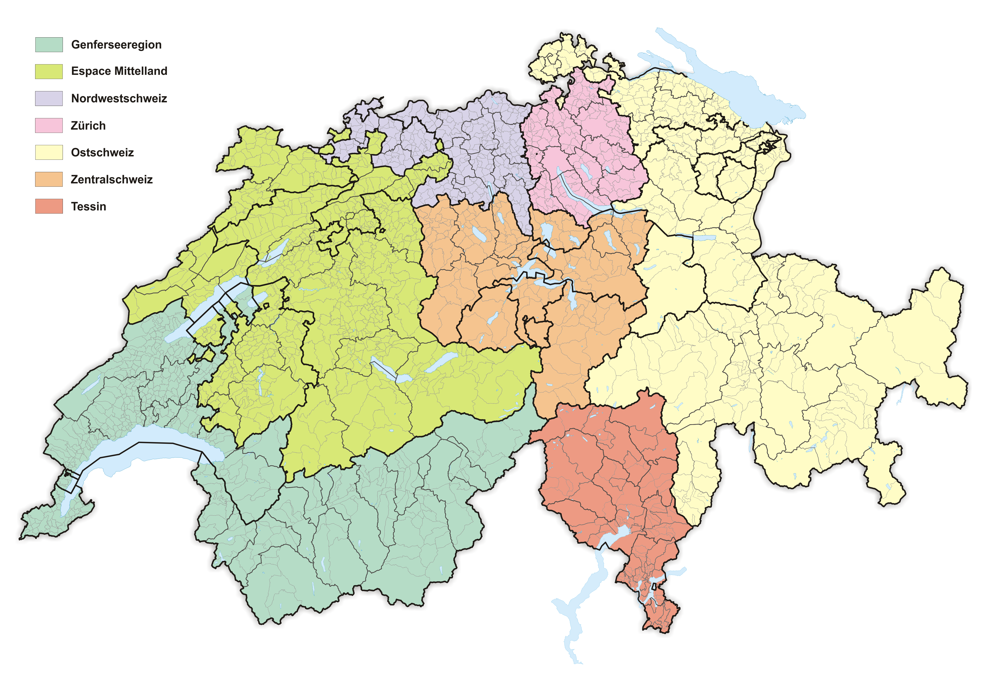 Grossregionen der Schweiz